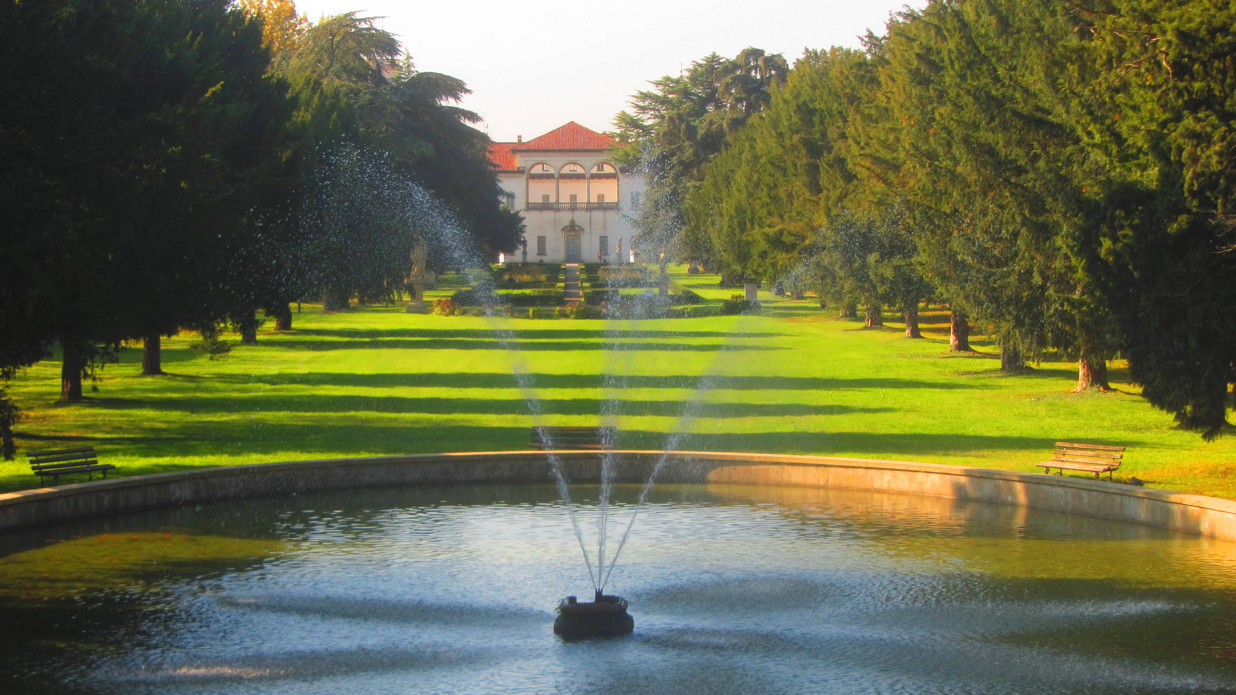 Foto scattata dall'alto della Fontana dei Cammelli all'ora del tramonto. This is a photo of a monument which is part of cultural heritage of Italy.